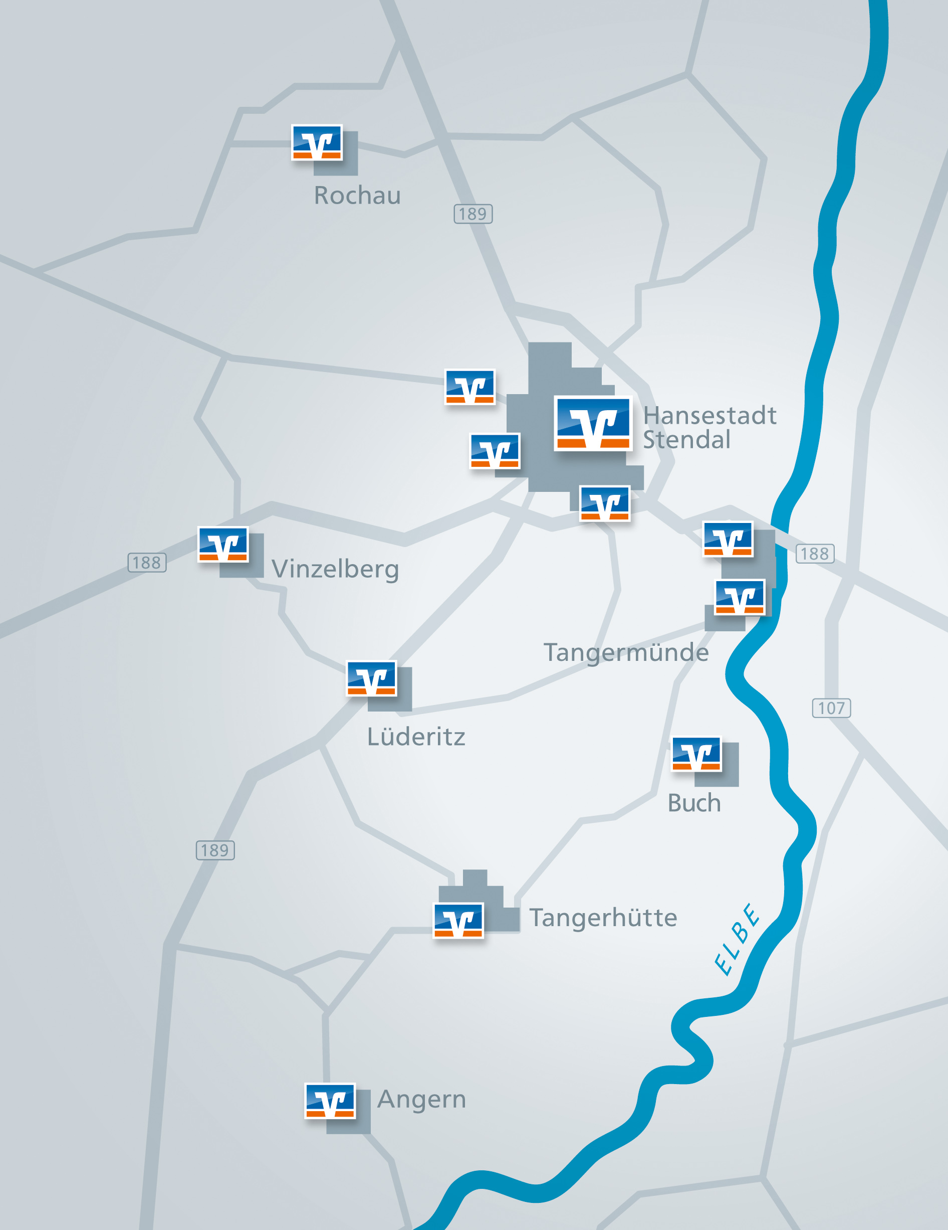 Filialkarte der Volksbank Stendal eG